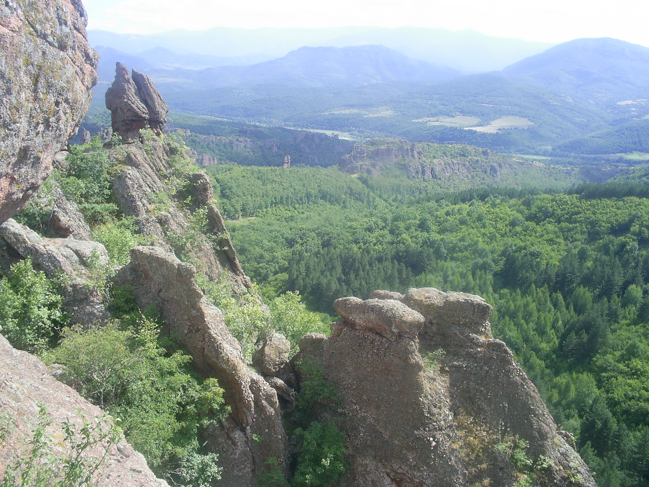 Prebalkan, part from Balkan Mountains